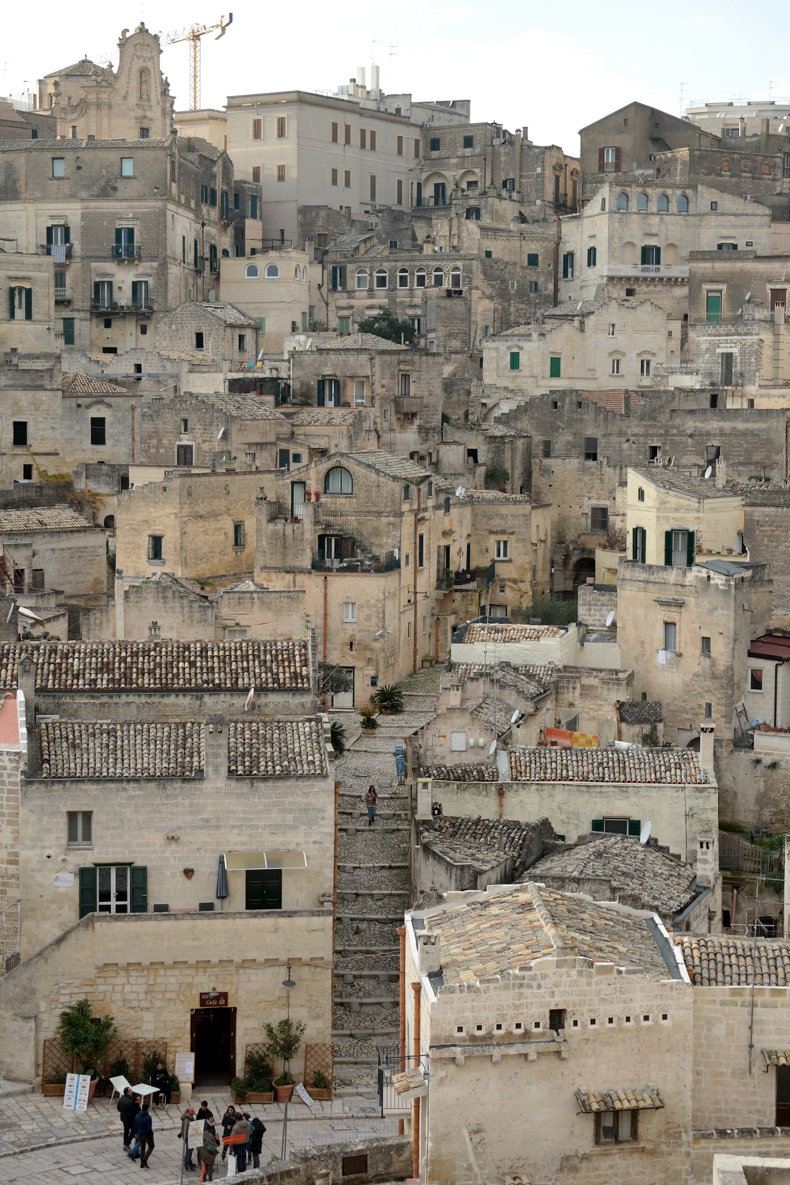 Veduta dei Sassi di Matera dalla Chiesa di Santa Maria di Idris